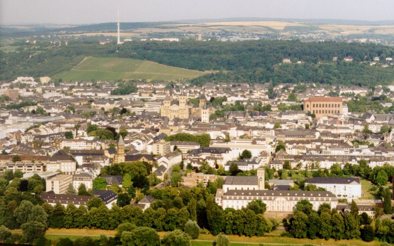 Trier Innenstadt - Blick von der Mariensäule